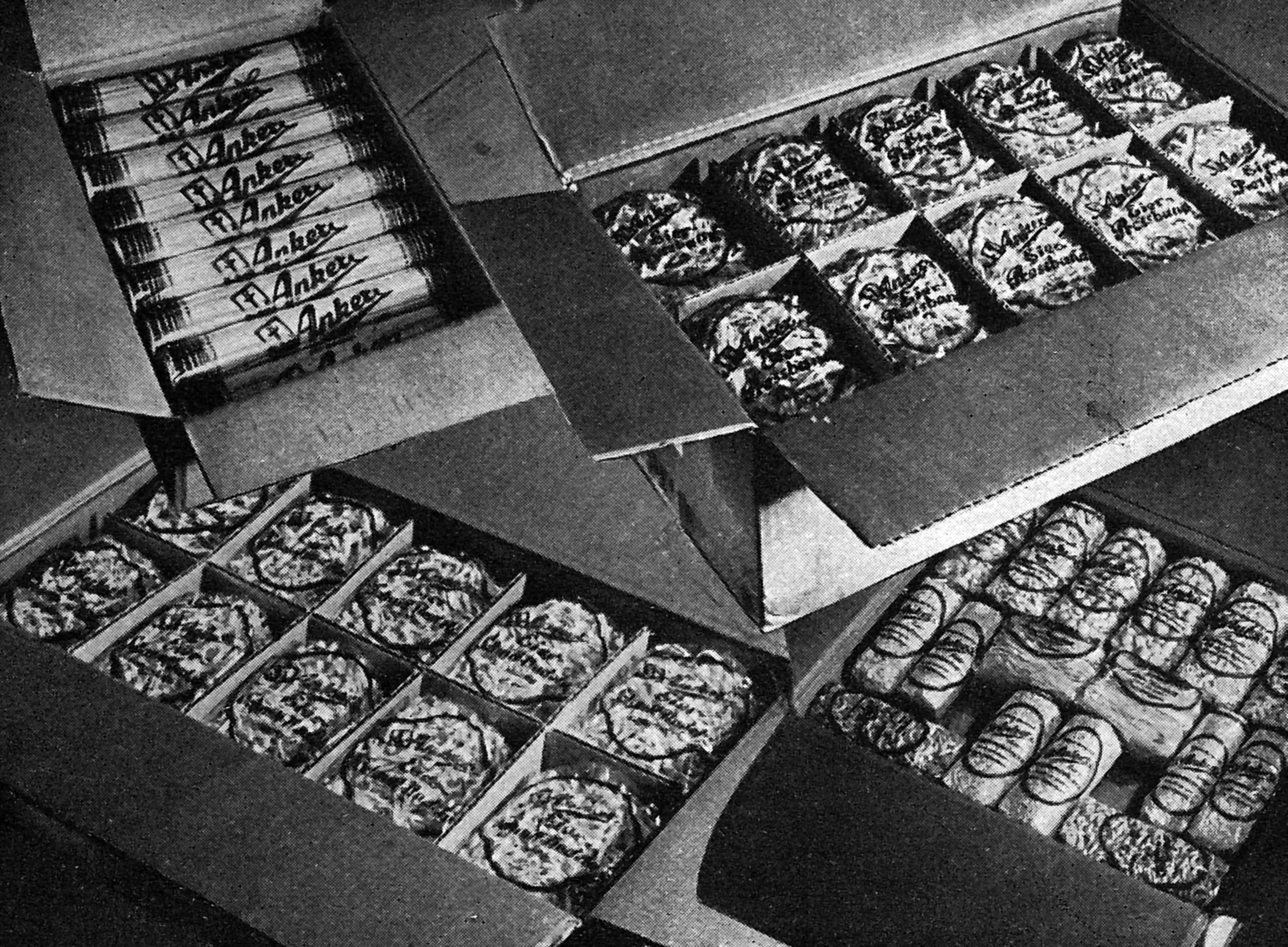 Anker-Cellophan-Verpackung